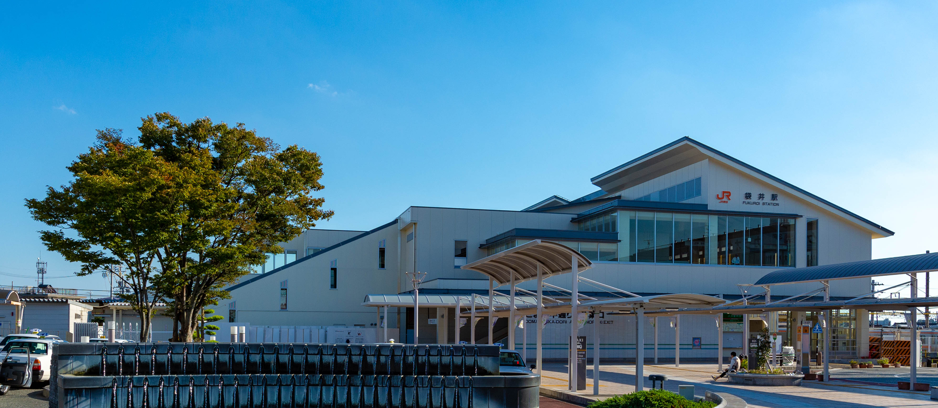 東海旅客鉄道株式会社東海道本線袋井駅駅舎